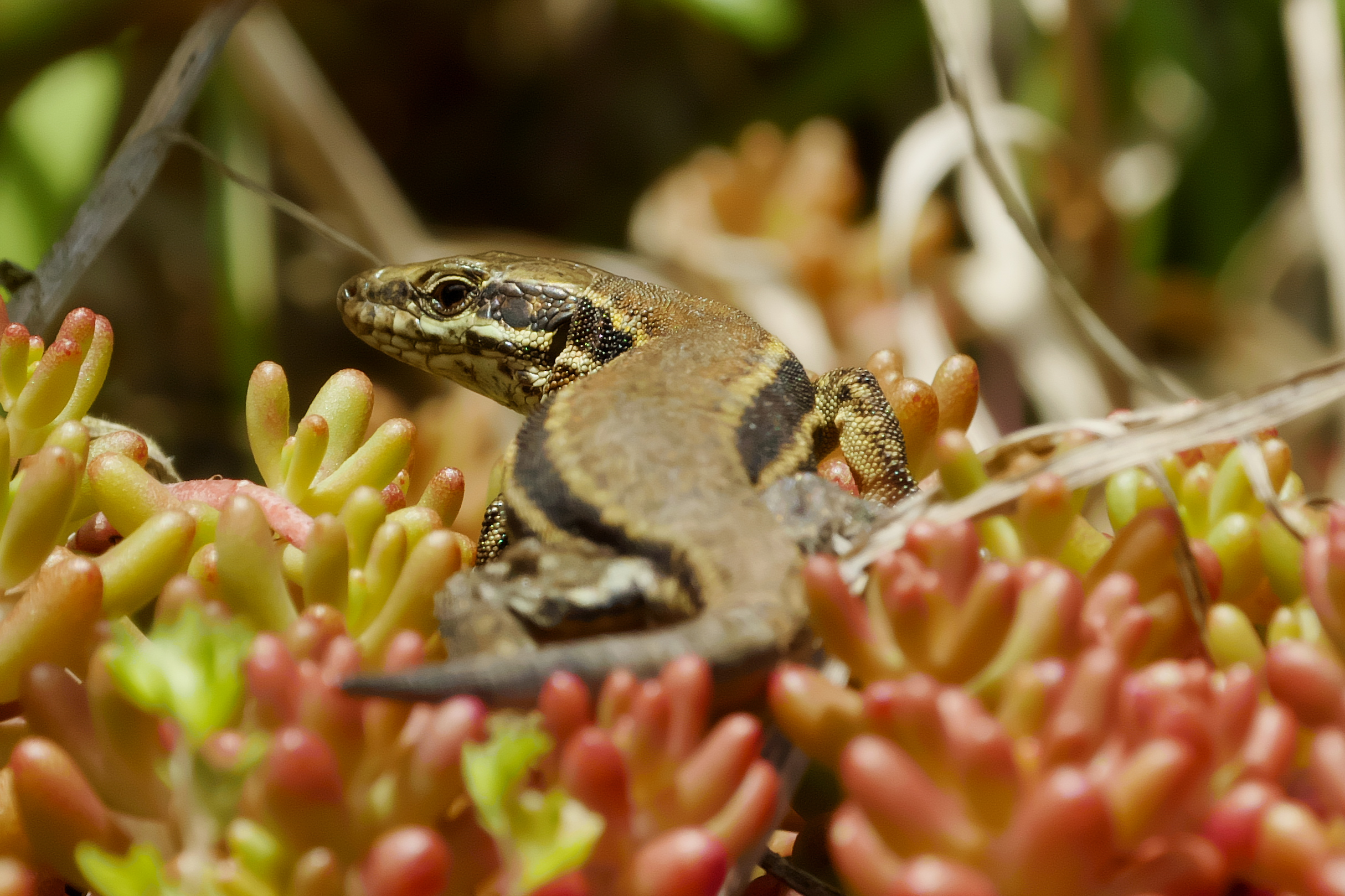 Mauereidechse auf Mauerpfeffer im Landschaftsschutzgebiet Moselgebiet von Schweich bis Koblenz (07-LSG-71-2) bei Ediger in Rheinland-Pfalz.